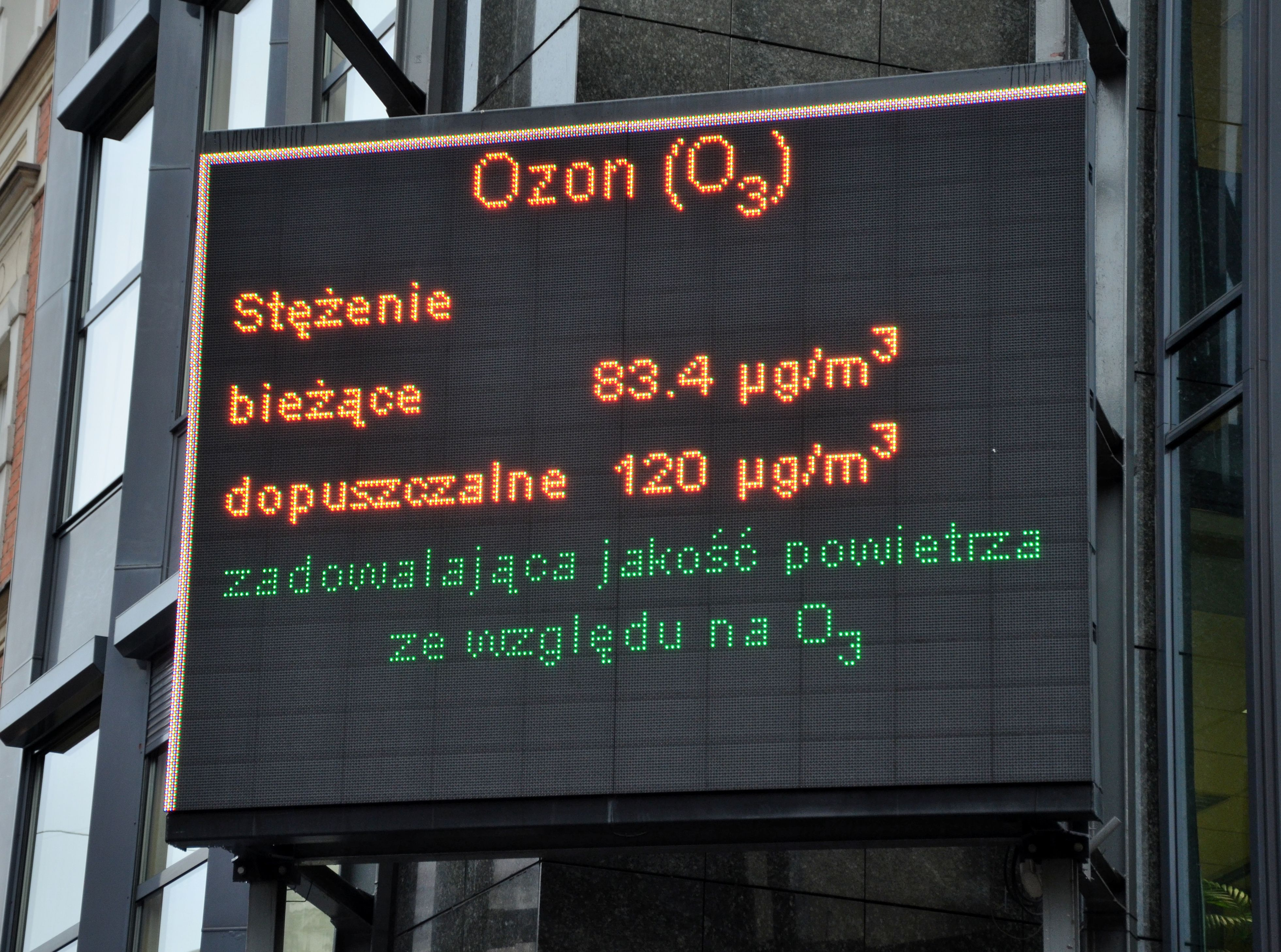 Komunikat o jakości powietrza w Katowicach 7.10.2011 godz. 9.10